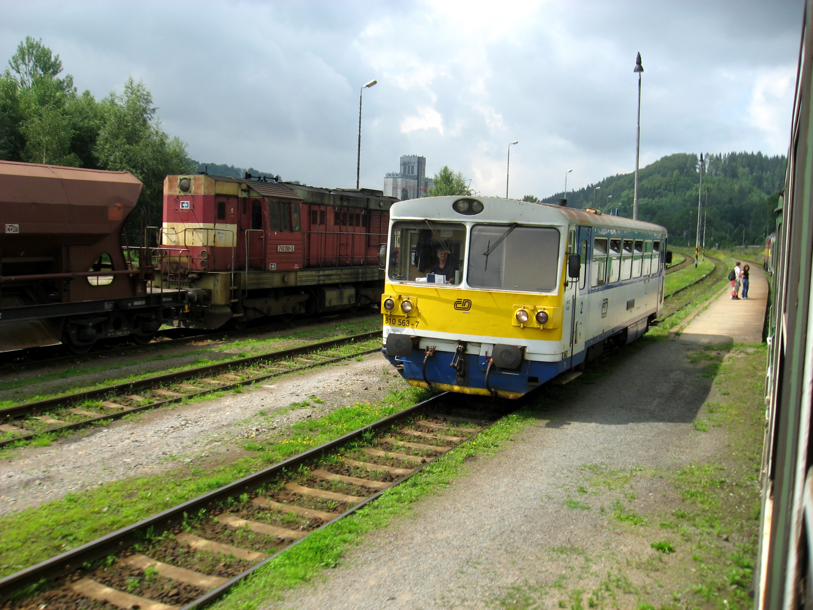 Motorový vůz 810 na železniční stranici Trutnov střed